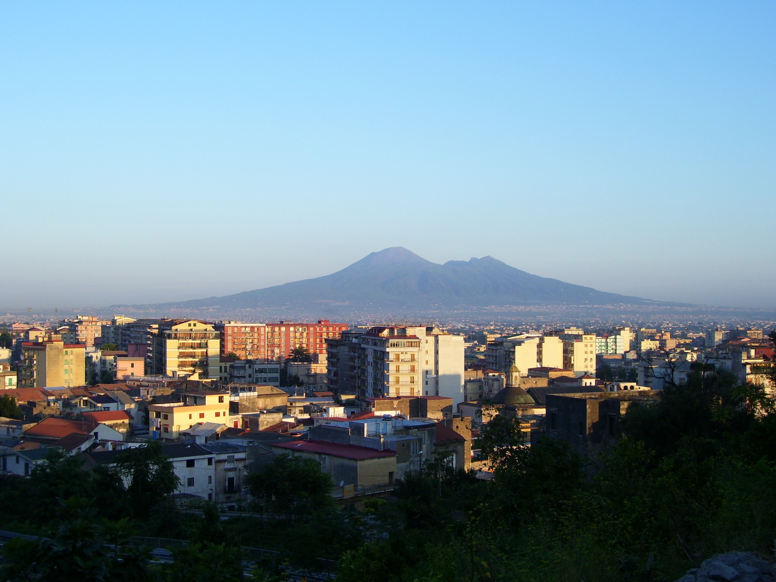 Foto panoramica di Pagani, provincia di Salerno